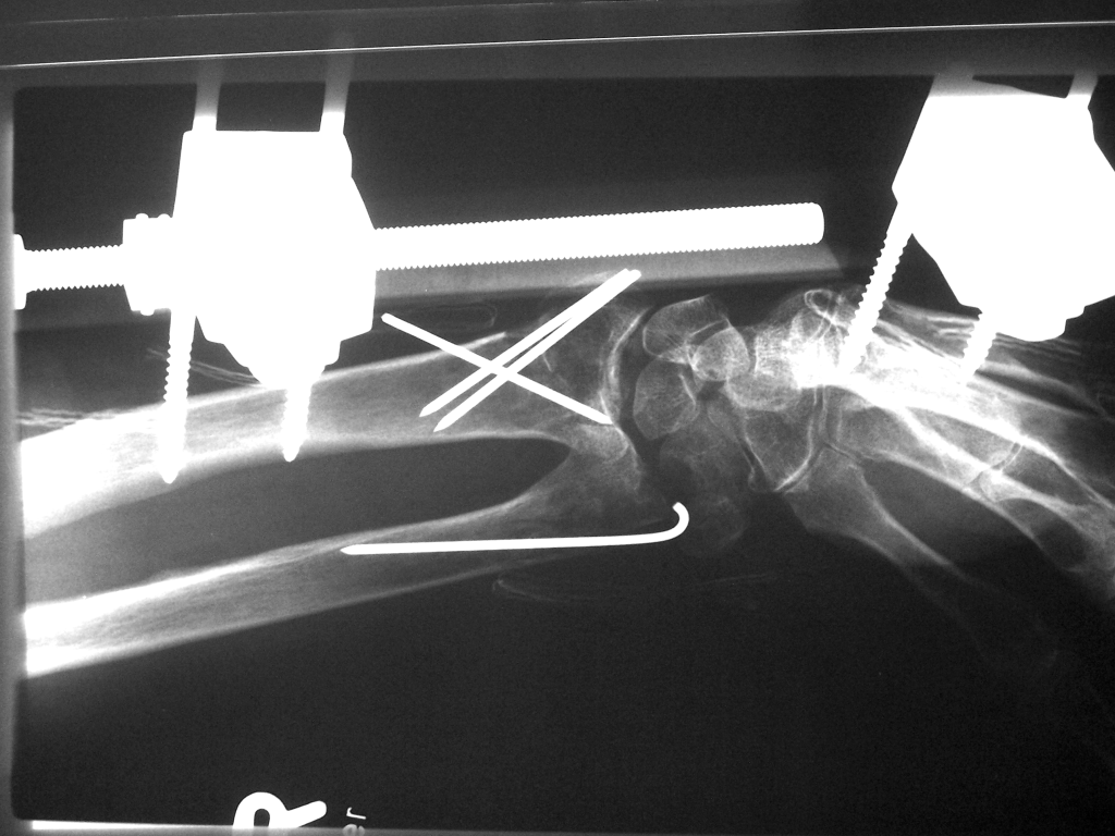 Unterarmtrümmerfraktur, versorgt mit Fixateur und Kirschnerdrähten